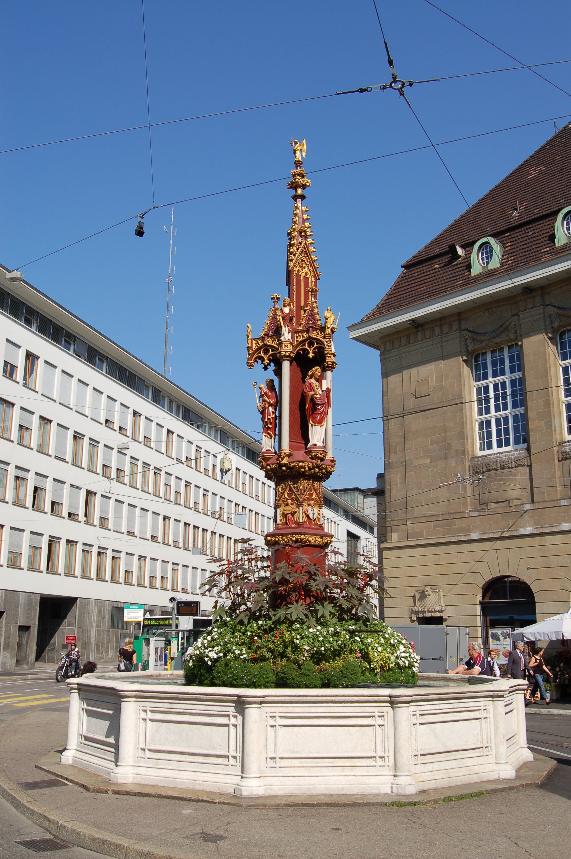 «Fischmarktbrunnen» am Basler «Fischmarkt»-Platz. Es handelt sich um eine Kopie. Das Original des Brunnstocks aus dem 14. Jahrhundert steht ohne Brunntrog seit 1910 im Historischen Museum Basel.)